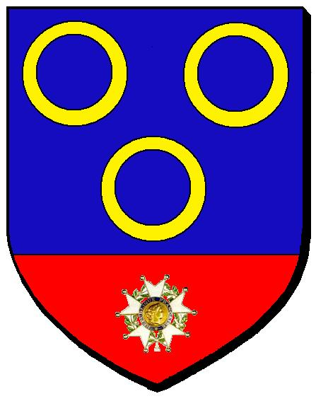 Blason Chalon su Saône